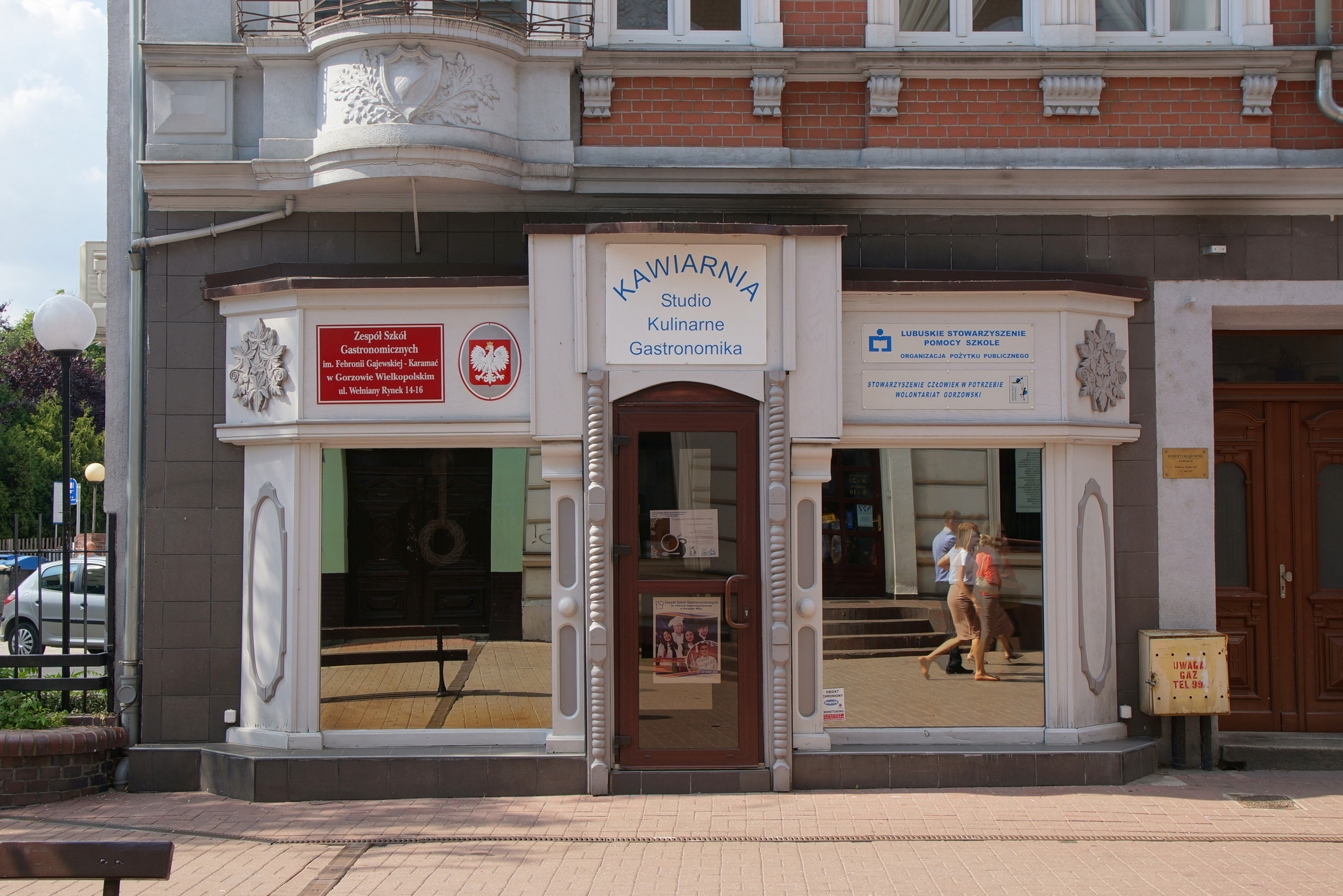 Gorzów Wlkp. ul. Wełniany Rynek. Kawiarnia Zespołu Szkół Gastronomicznych im. Febronii Gajewskiej-Karamać. Kawiarnia powstała w 2015 r. i prowadzona jest przez uczniów szkoły, wolontariuszy i w ramach warsztatów terapii zajęciowej - niepełnosprawną młodzież.